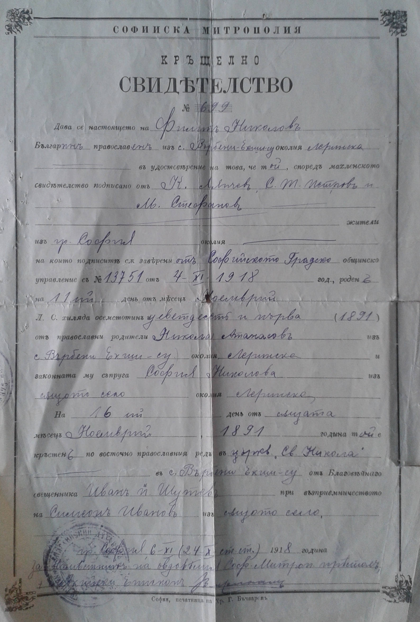 Birth certificate of Filip Nikolov from Gorno Varbeni, 1891.